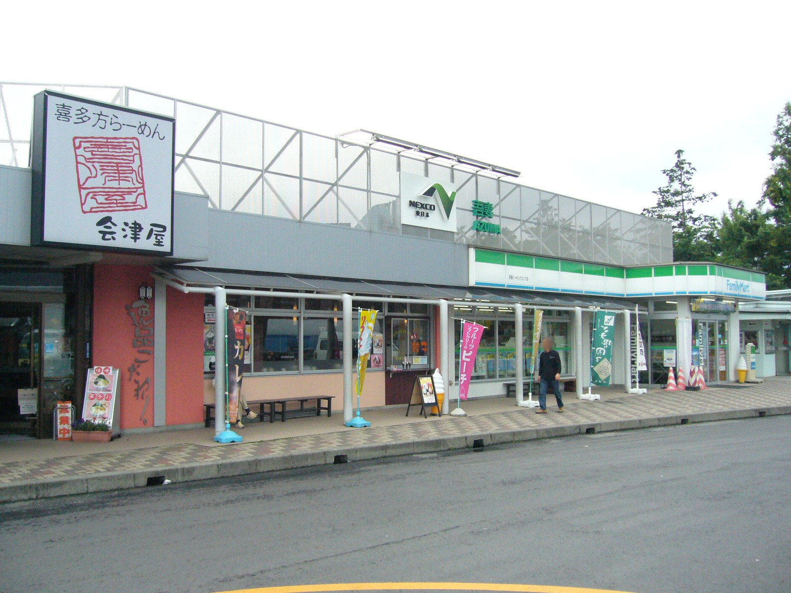 azuma-PA-tohoku-expressway,hukushima-city,japan